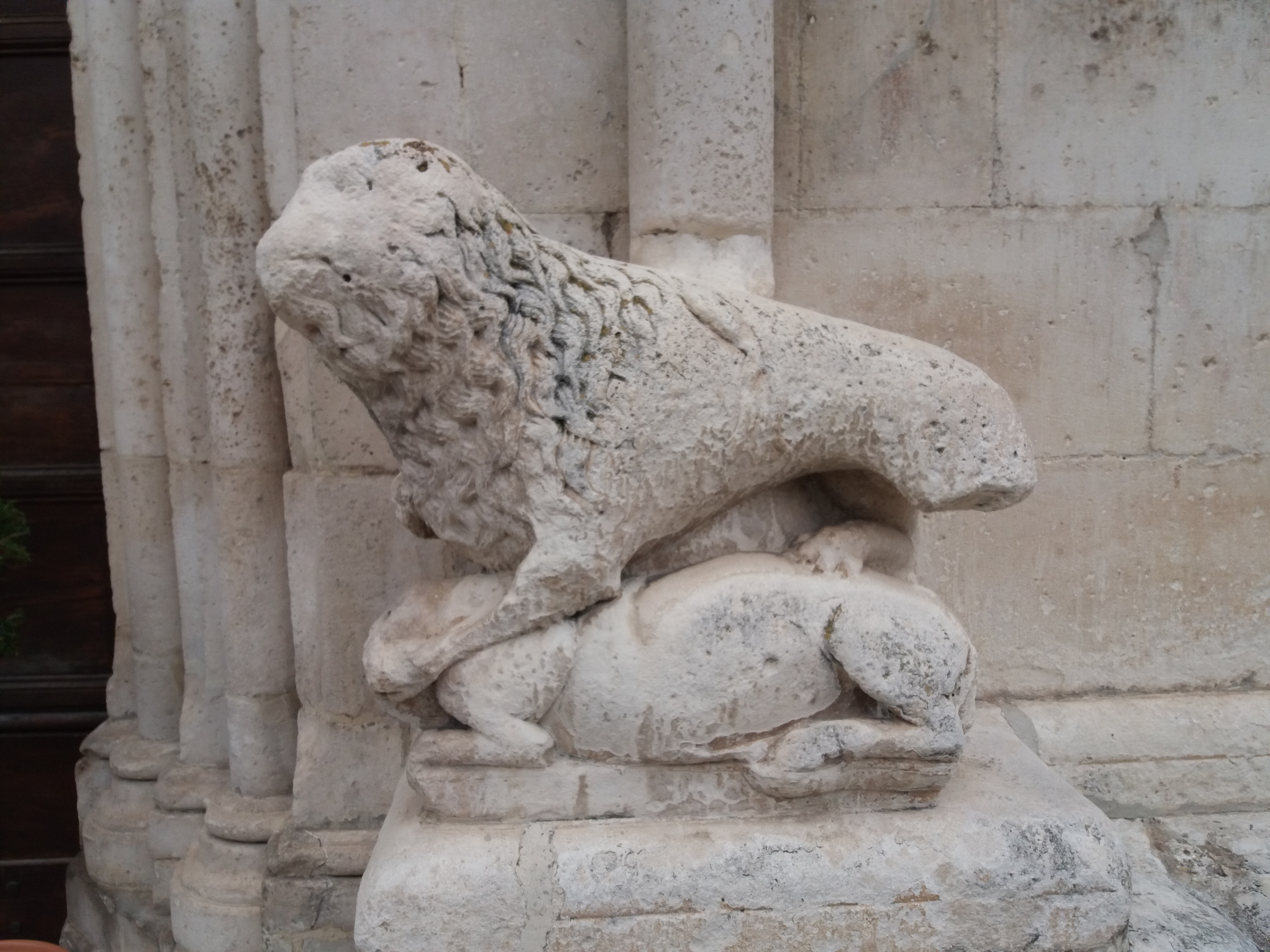 Sulmona: Cattedrale di San Panfilo